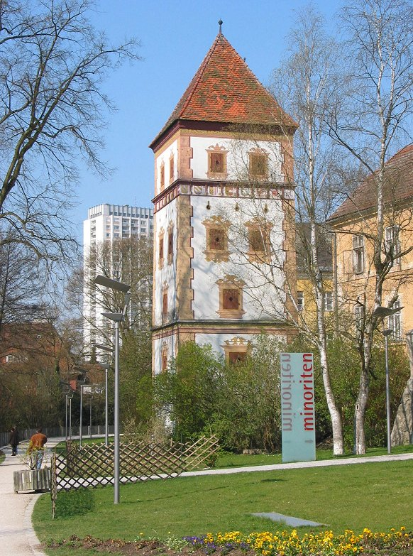 Wasserturm in Wels